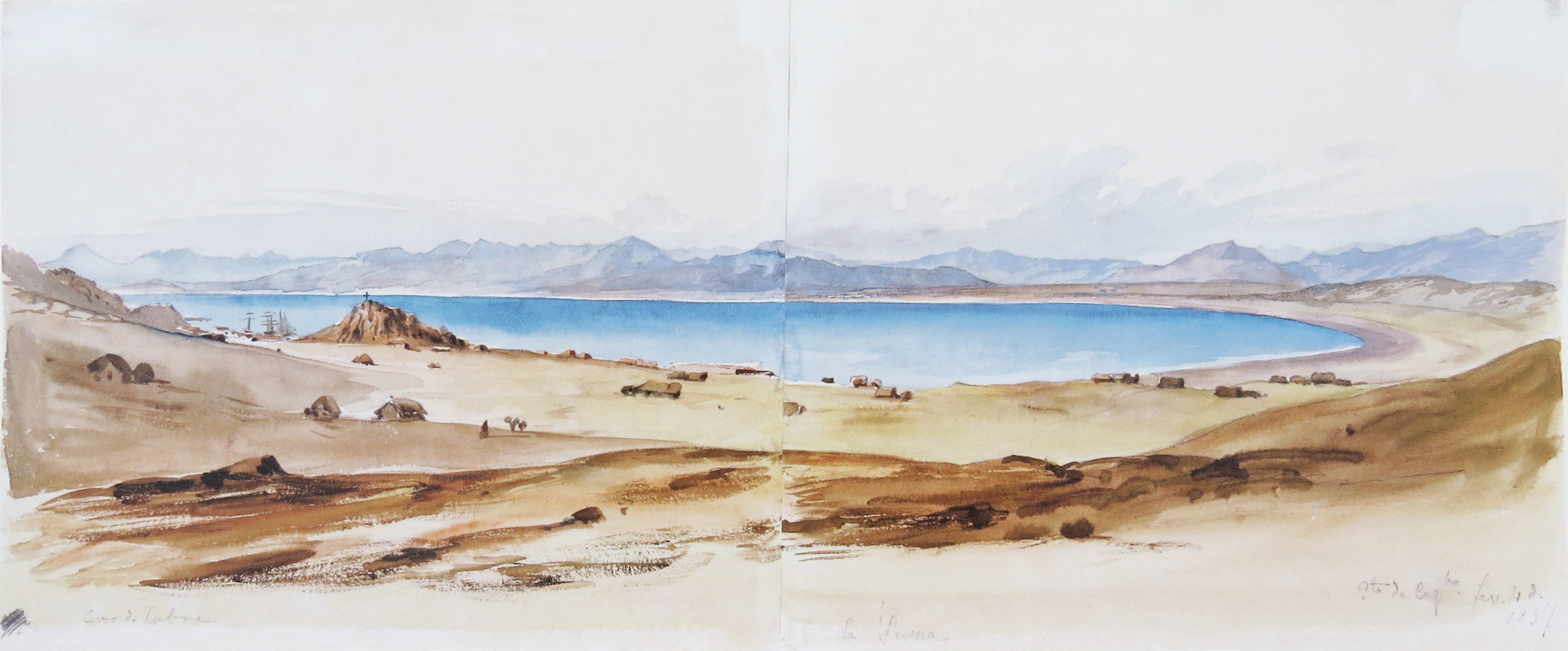 Puerto de Coquimbo, Febrero de 1837, Johann Moritz Rugendas.